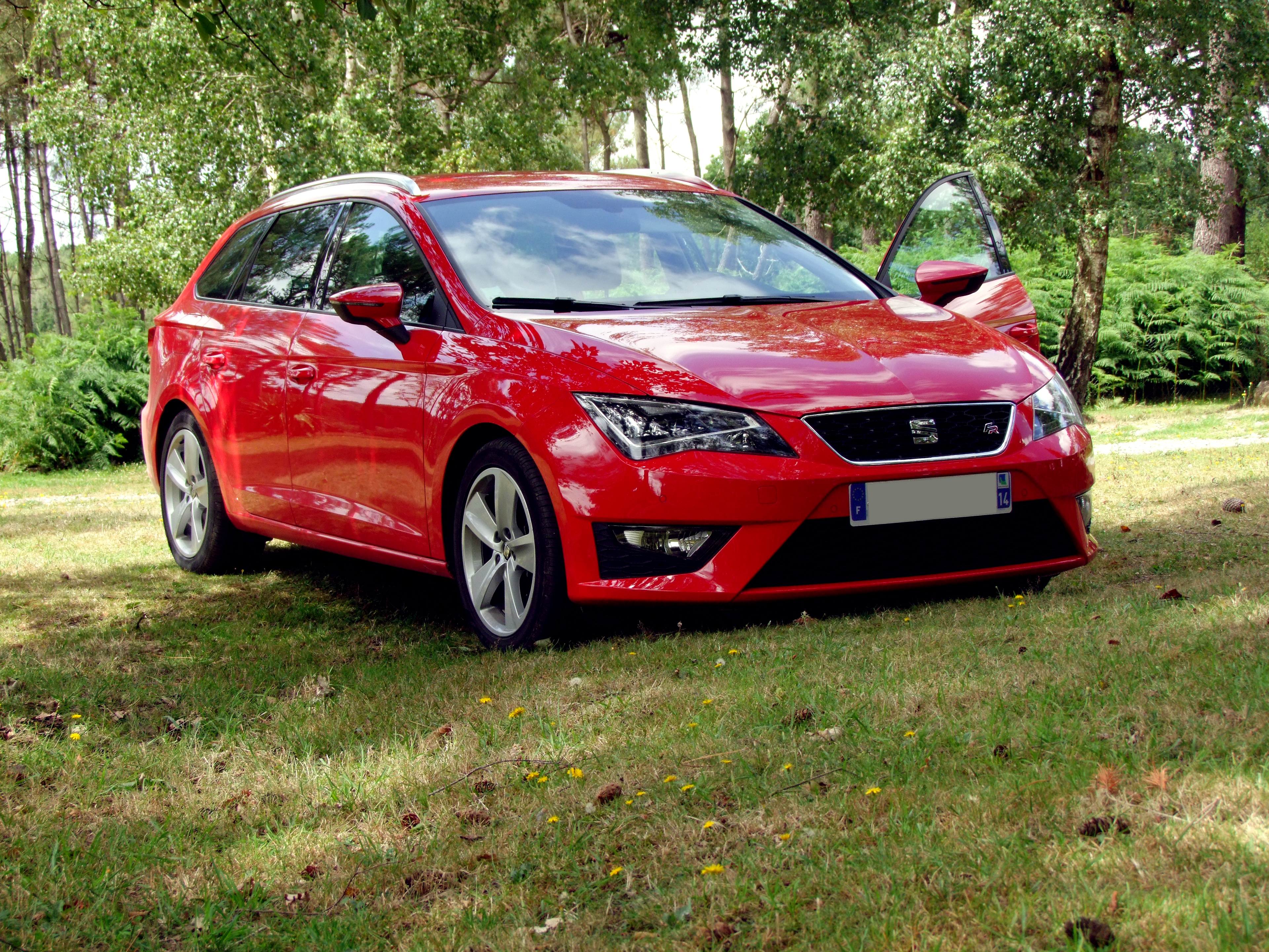 Seat Leon ST FR 4 Drive 150